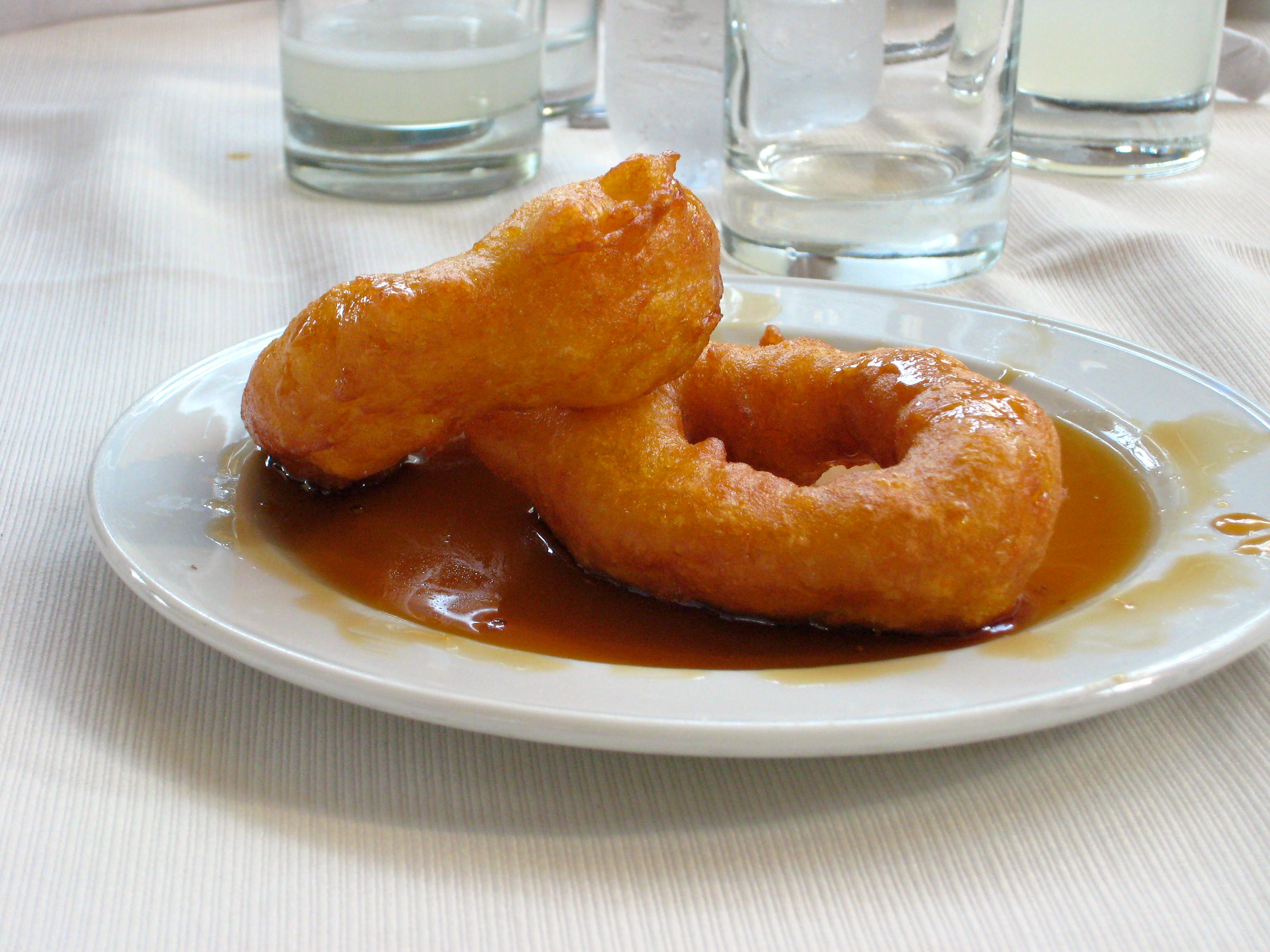 I love picarones too!